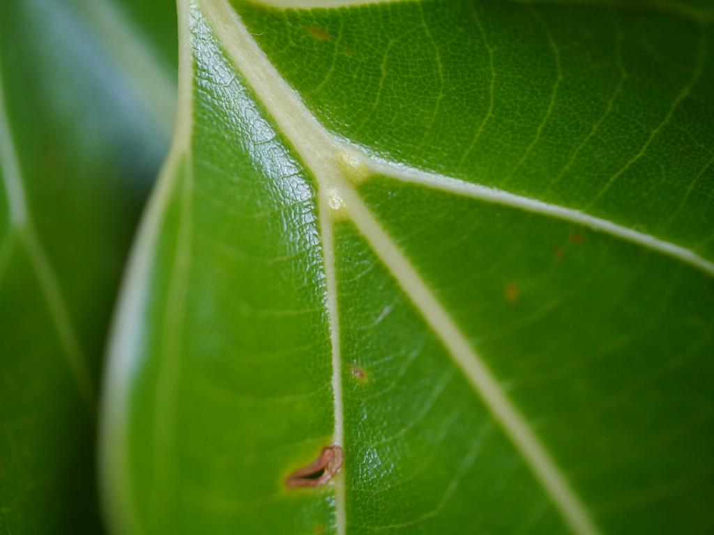 Cinnamomum camphora：クスノキのダニ室 2017/06/04 和歌山県田辺市：Tanabe City. Wakayama Pref. Japan